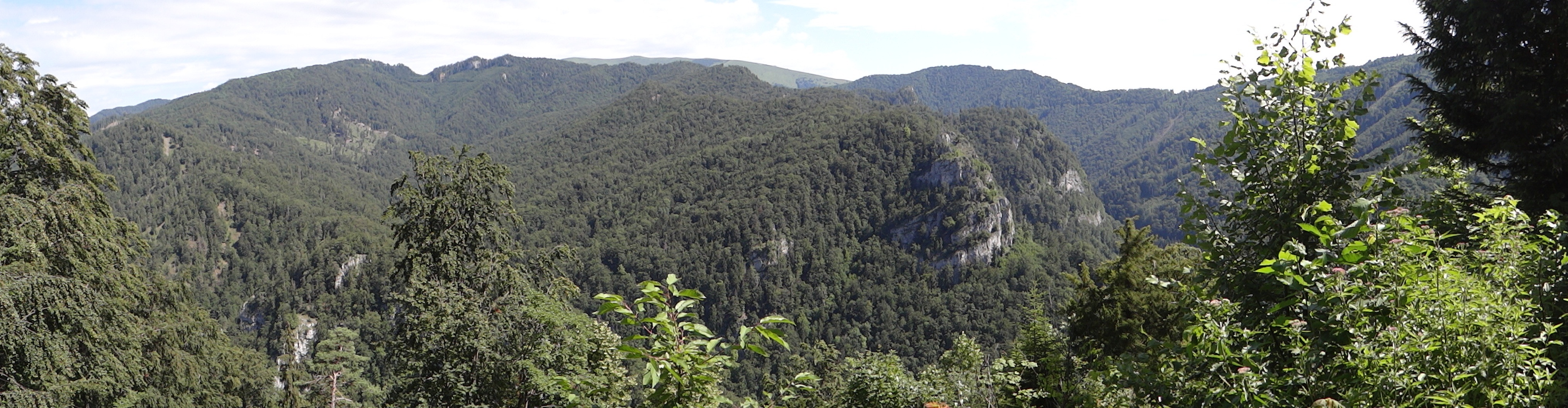 Widok spod Jaskini Harmanieckiej na Harmanecką dolinę i jej odnogi: dolinę Rakytov i Bystricką dolinę